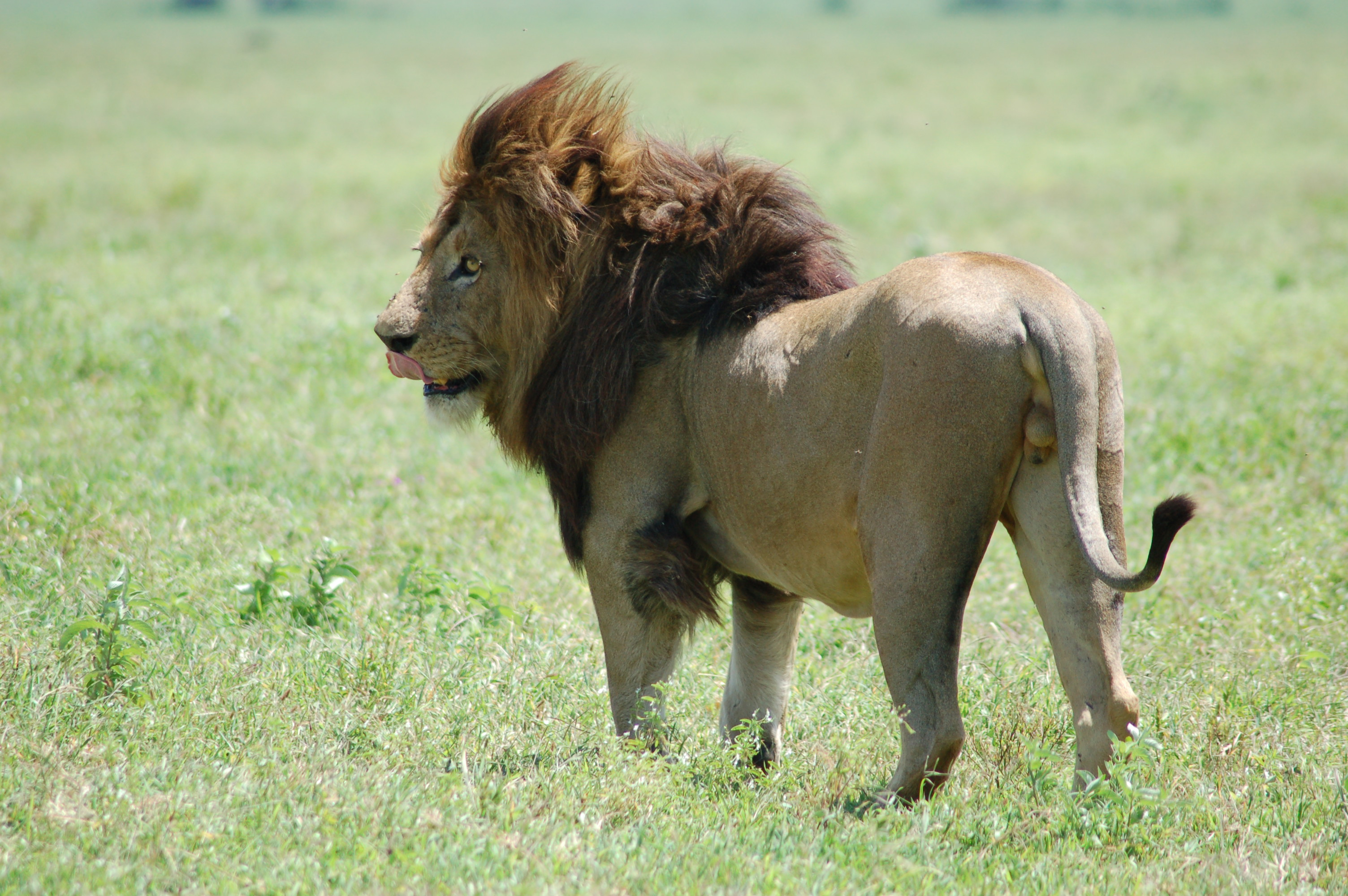 Ngorongoro Crater, Tanzania